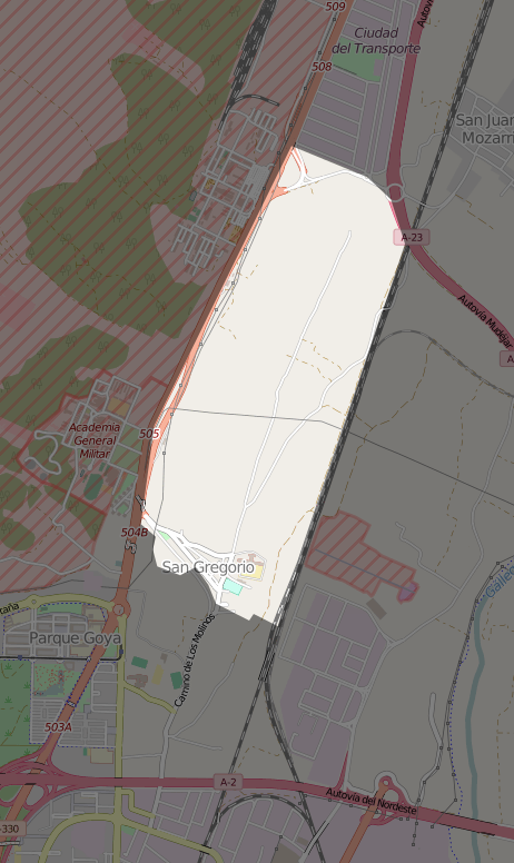 Mapa del distrito de San Gregorio en Zaragoza.